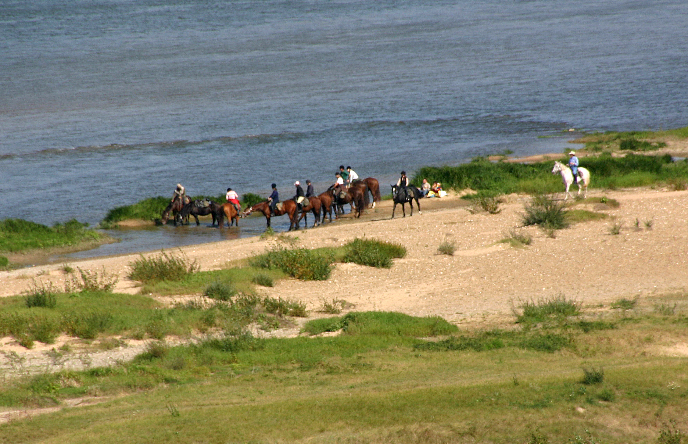 Loire bei Chaumont